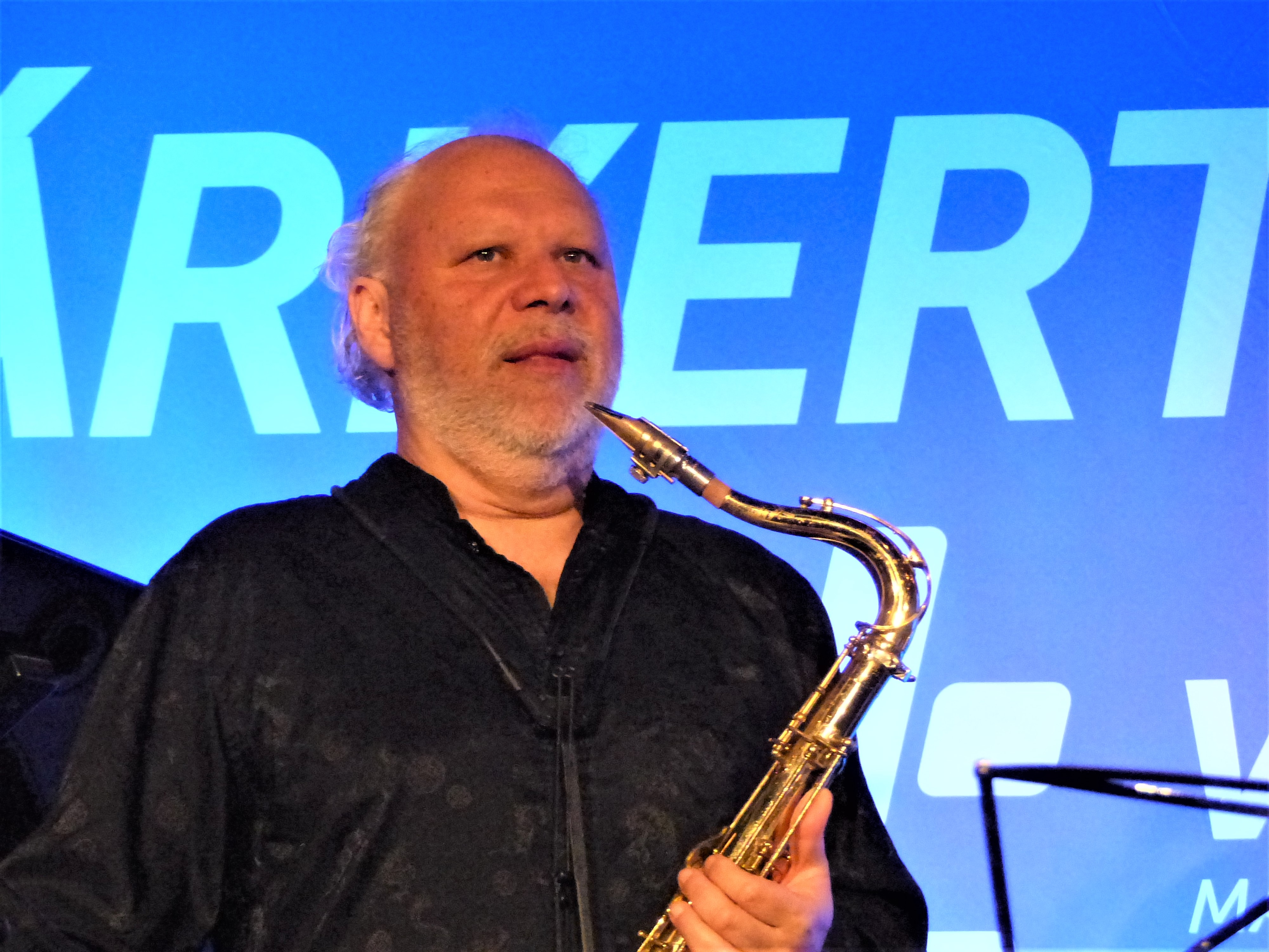 A felvételek 2018. április 13-án, pénteken készült a Várkert Bazárban, Budapesten. Bazár Eclectica. Tony Lakatos. V4 Koncertek.